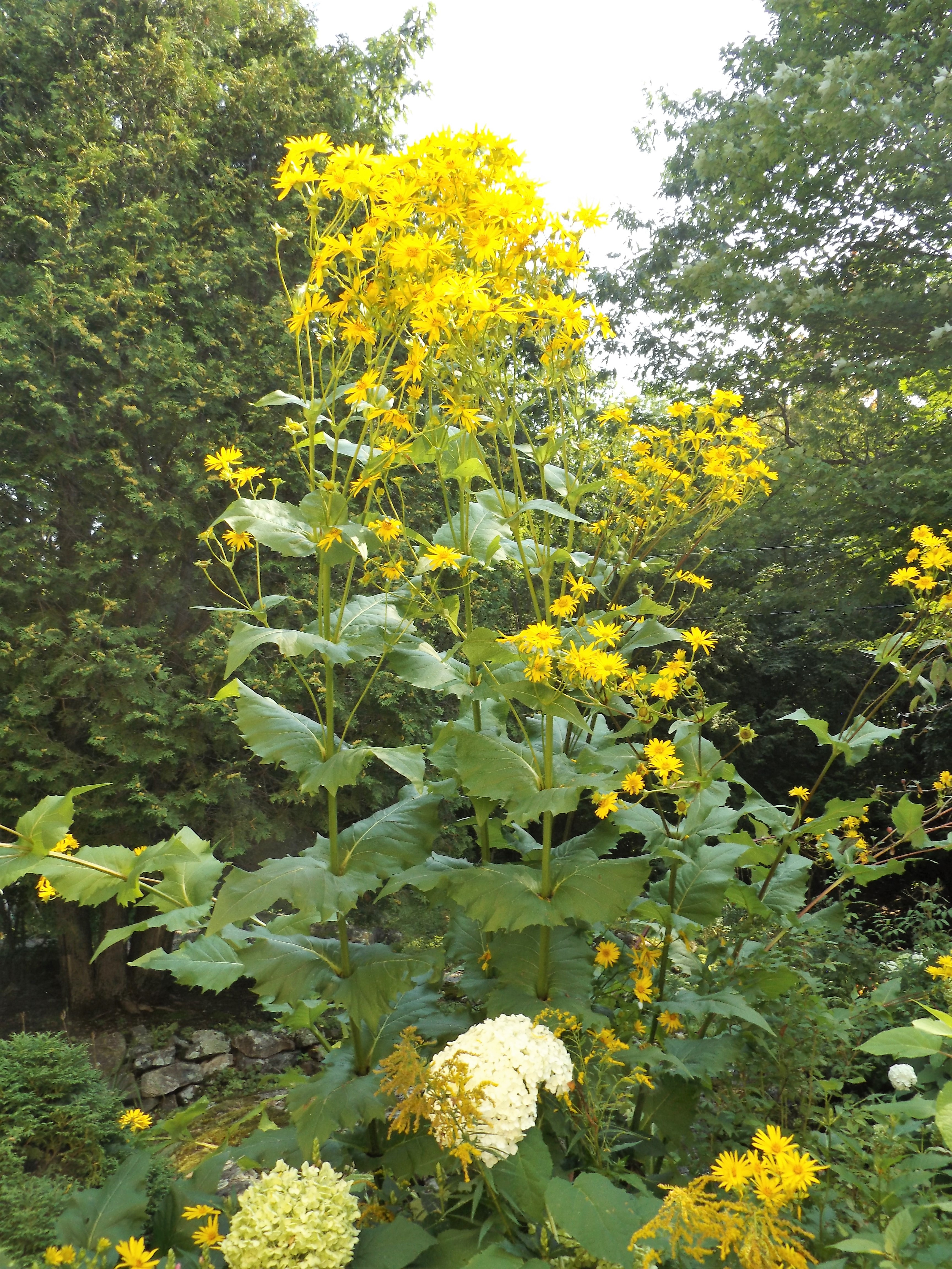 Silphium perfoliatum dans un jardin apparence générale (hauteur plus de 2m ), Sud du Québec.